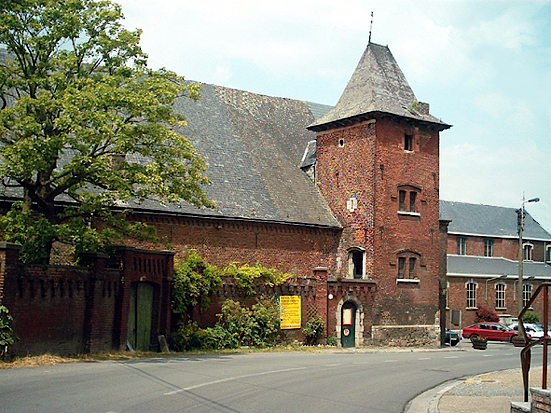 Façade sud de la Ferme castrale de Hermalle-sous-Huy